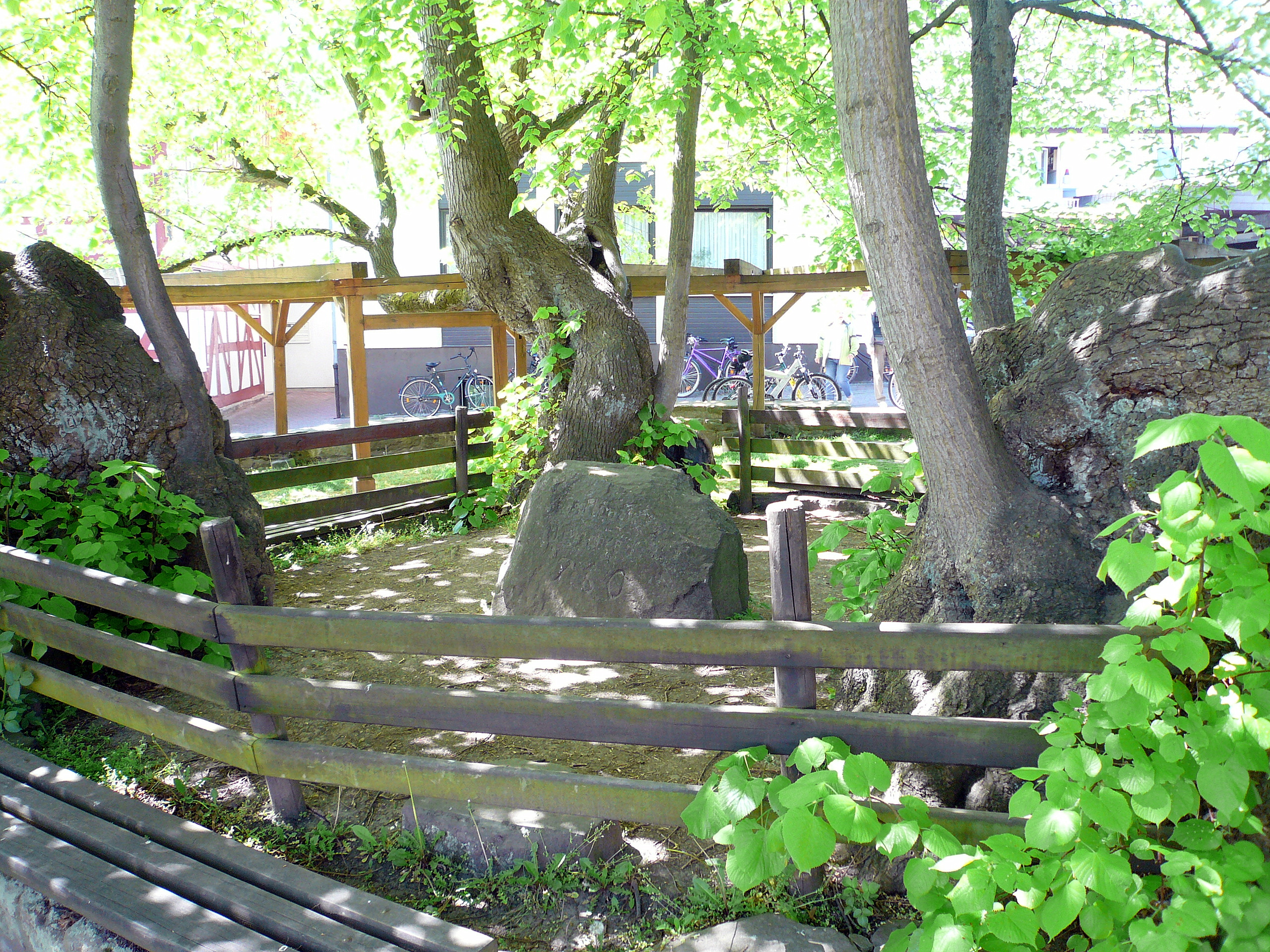 Lime in Schenklengsfeld, Germany